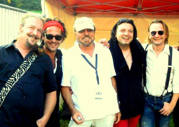 SOLOzuVIERT gemeinsam mit Karl Scheibameier vor einem Konzert in Bad Ischl.